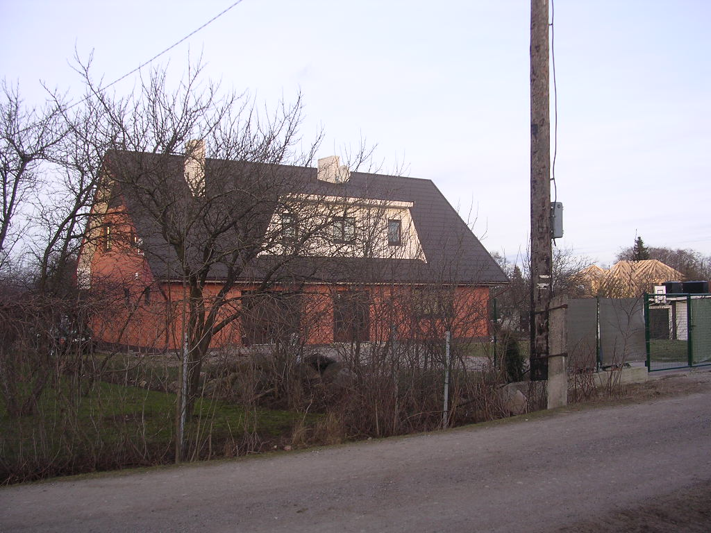 Kirsi tee, Metsakasti küla, Viimsi vald